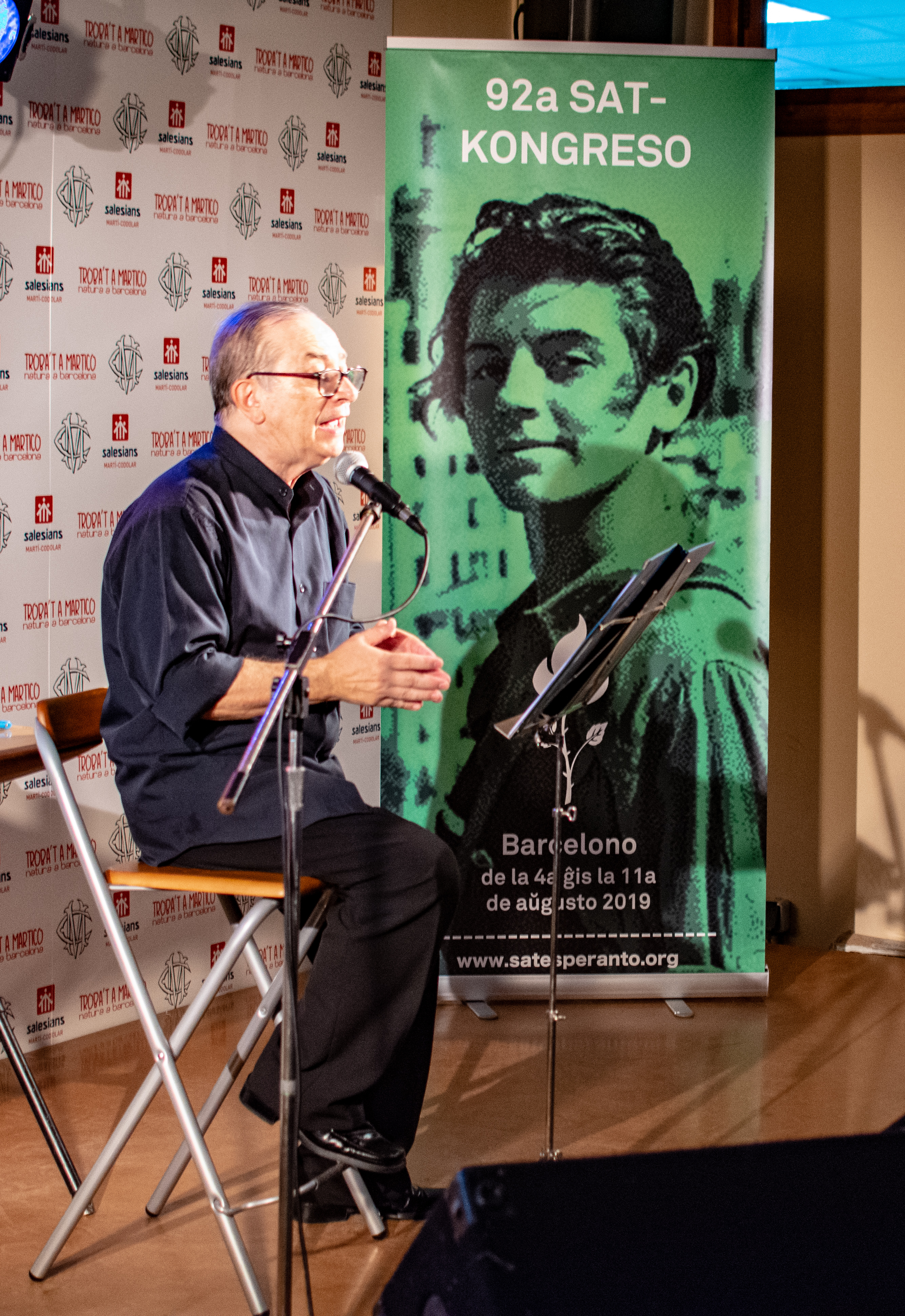 Poezia vespero de Miguel Fernandez dum la SAT-Kongreso 2019